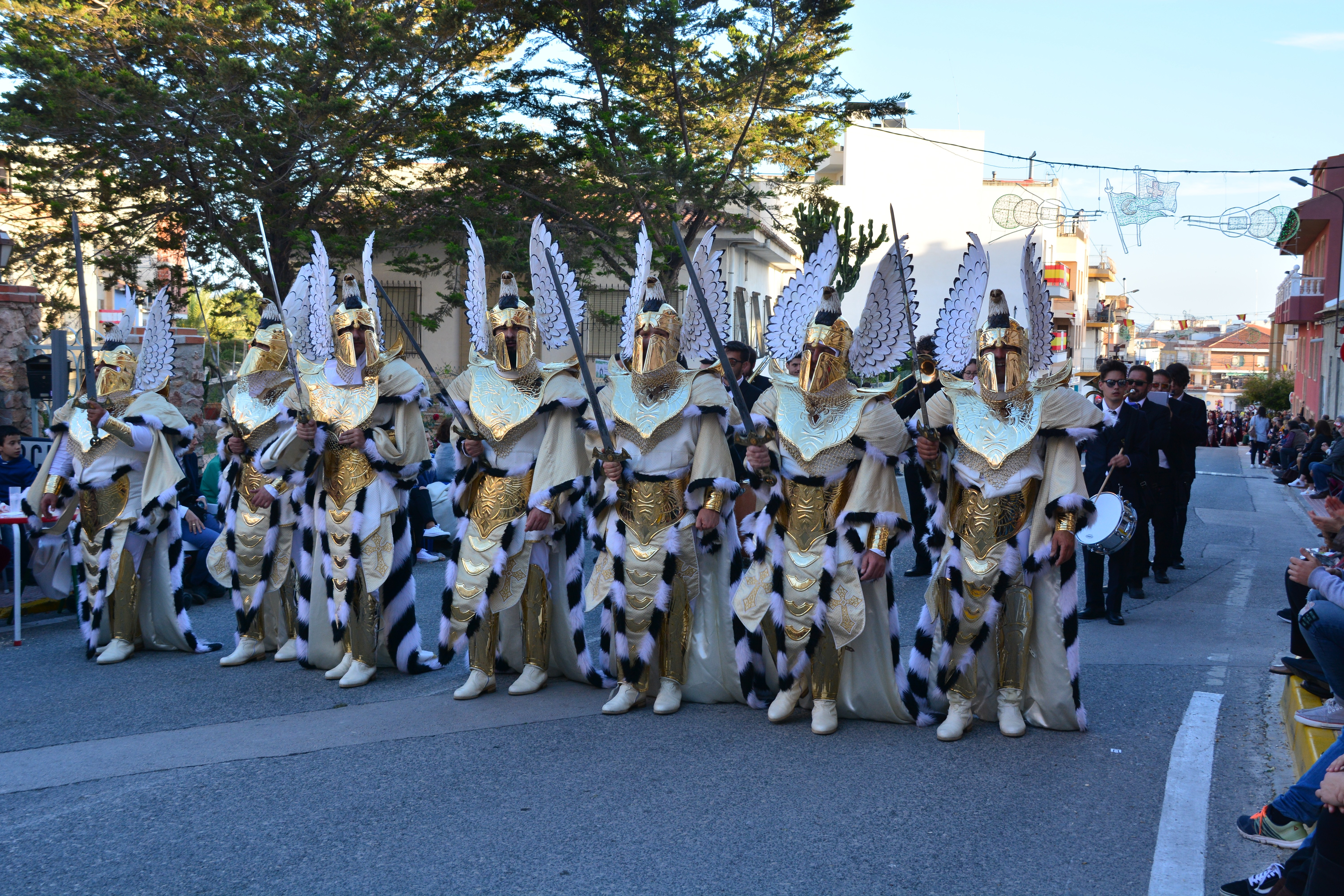 Moros y Cristianos de Abanilla This is a photography of a Folklore festival in Spain (Wikidata id Q23660880).